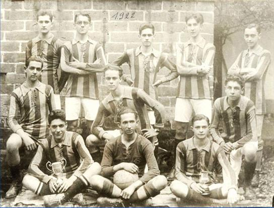 Independiente Medellín en 1922. De pie, de izq. a der., Diego Restrepo J., Bernabé Correa M., Samuel Uribe E., Estanislao "Talao" Uribe A. Y Julio Navarro; al centro, Carlos A. Jaramillo, Alberto Molina C., y Paco Navarro; sentados, Alfonso "Buchifa" Restrepo O., Miguel Arango y Fabio Jaramillo.